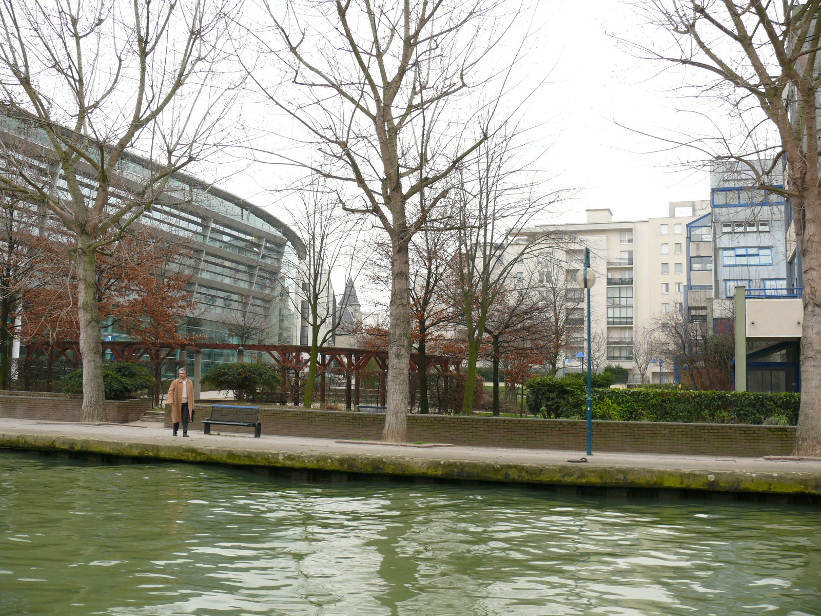 PANTIN : Mail Charles de Gaulle Depuis le Canal de l'Ourcq, vue vers le Mail Charles de gaulle : à gauche, le siège de la délégation de Petite couronne du Centre national de la fonction publique territoriale, au fond, le clocher de l'église Saint-Germains l'Auxerois de Pantin